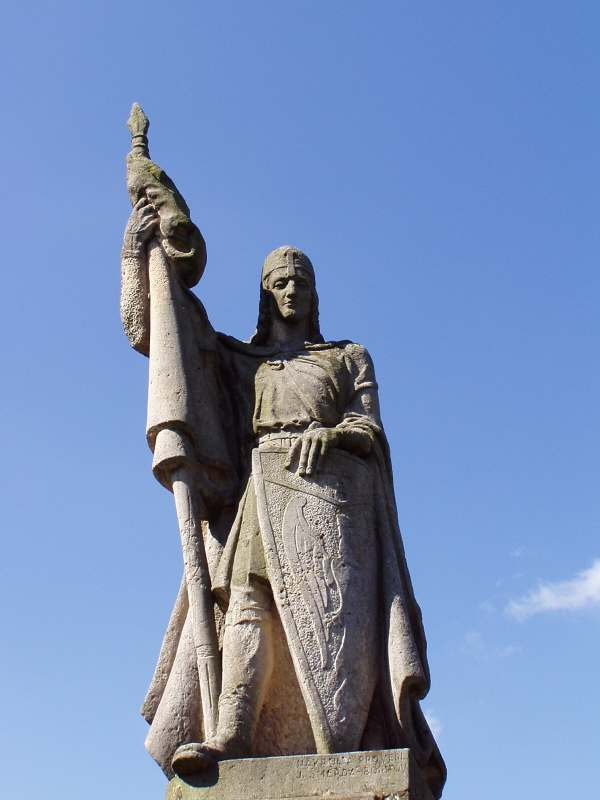 Socha sv. Václava